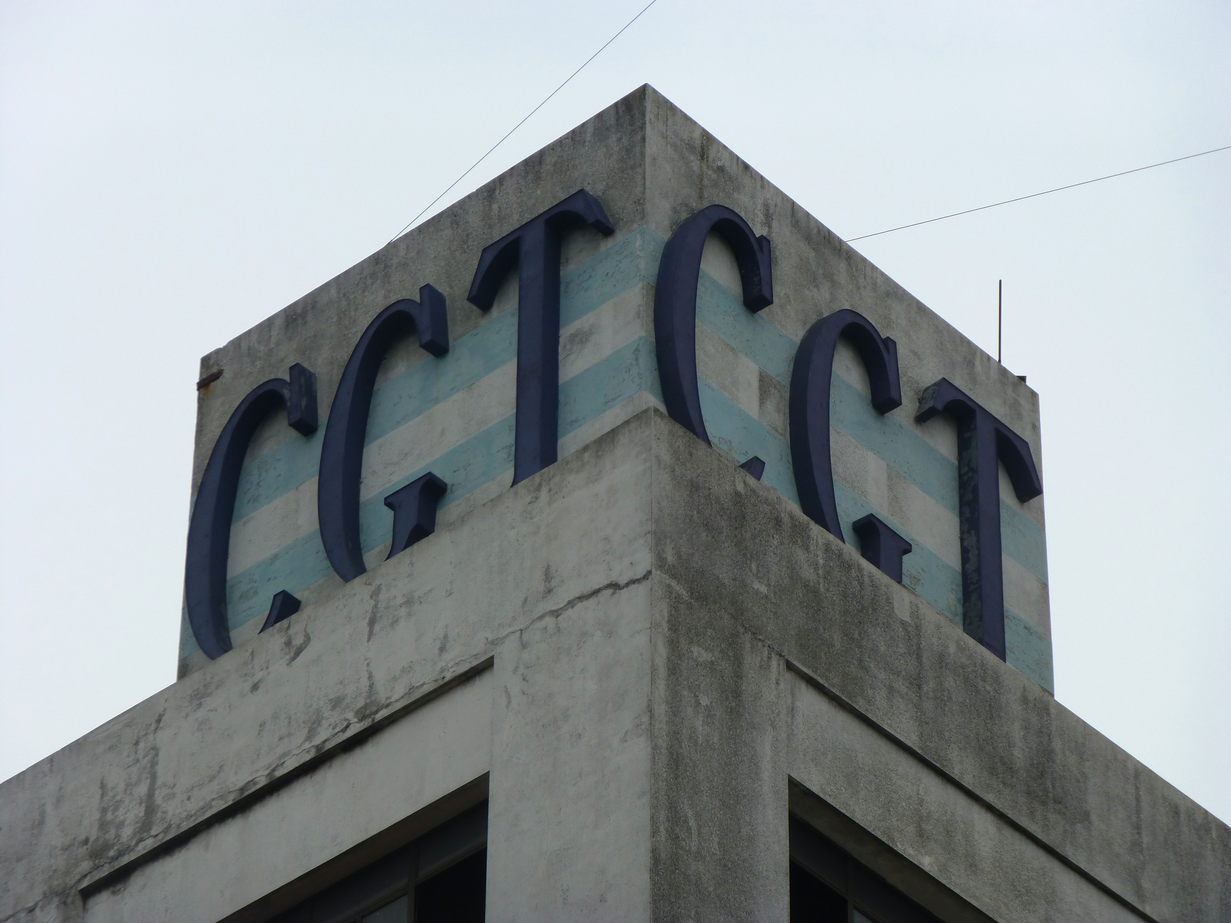 Letrero en la cima del edificio de la CGT de Azopardo.